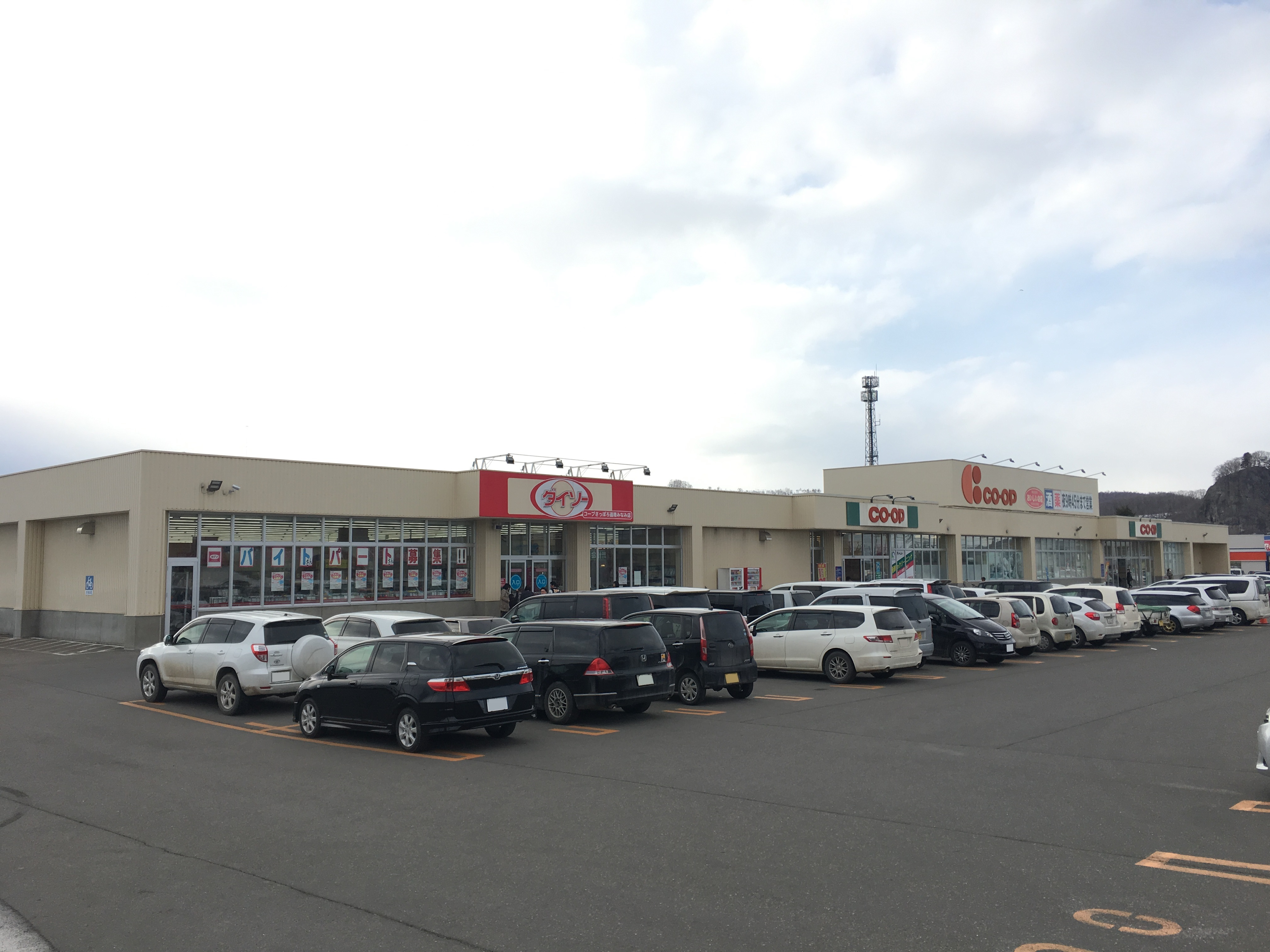 生活協同組合コープさっぽろ遠軽みなみ店（紋別郡遠軽町）